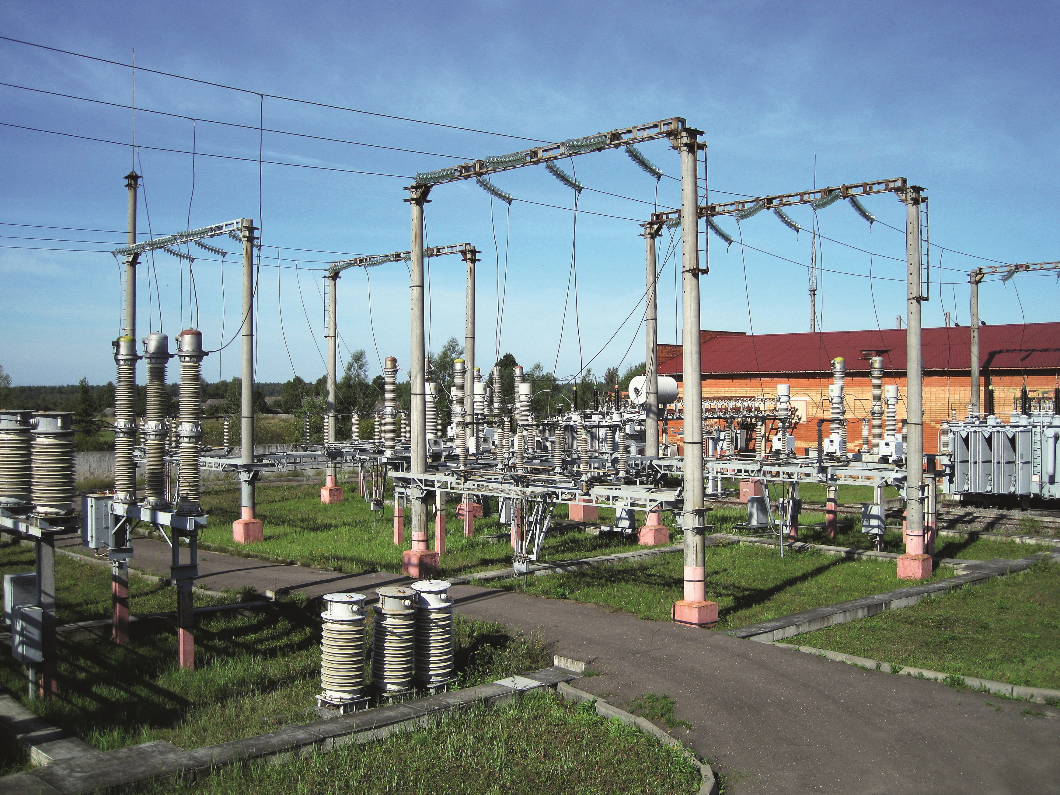 Строительство тяговой подстанции «Барановка» на участке скоростного движения Санкт-Петербург — Москва